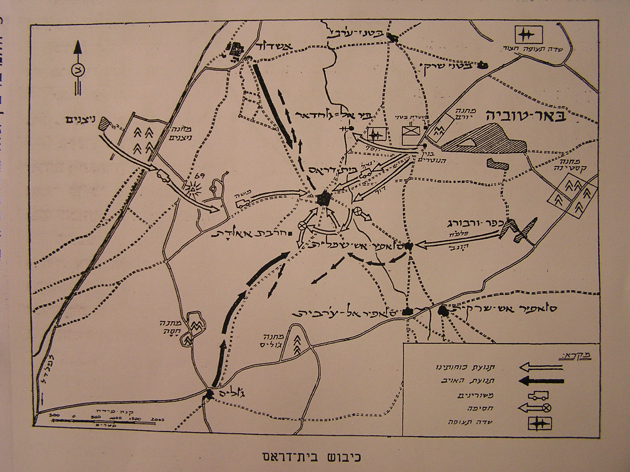 מפת הקרב על בית דאראס